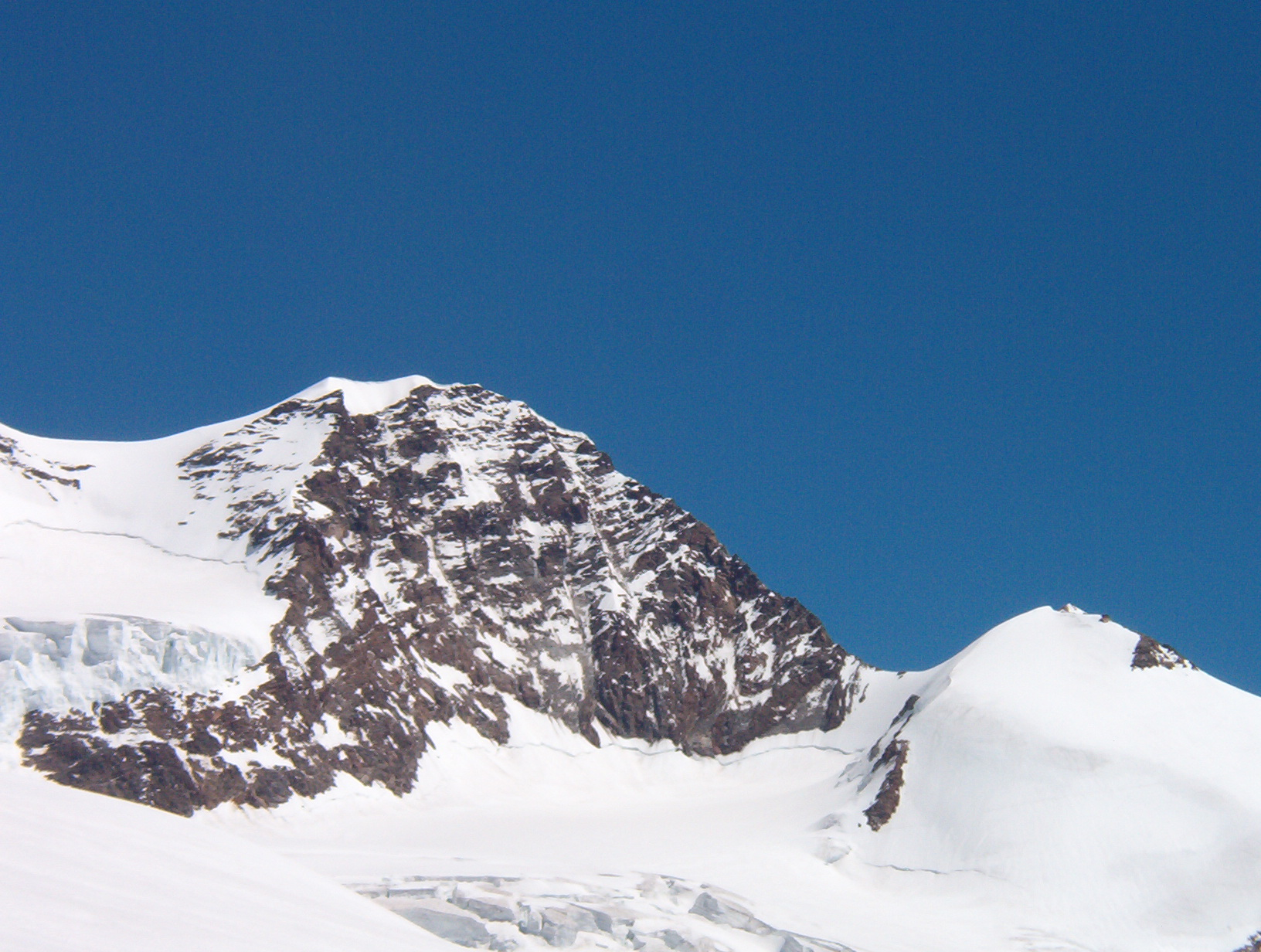 Lyskamm Orientale e Naso del Lyskamm dal Rifugio Quintino Sella al Felik - Valle di Gressoney - Valle d'Aosta - Italia